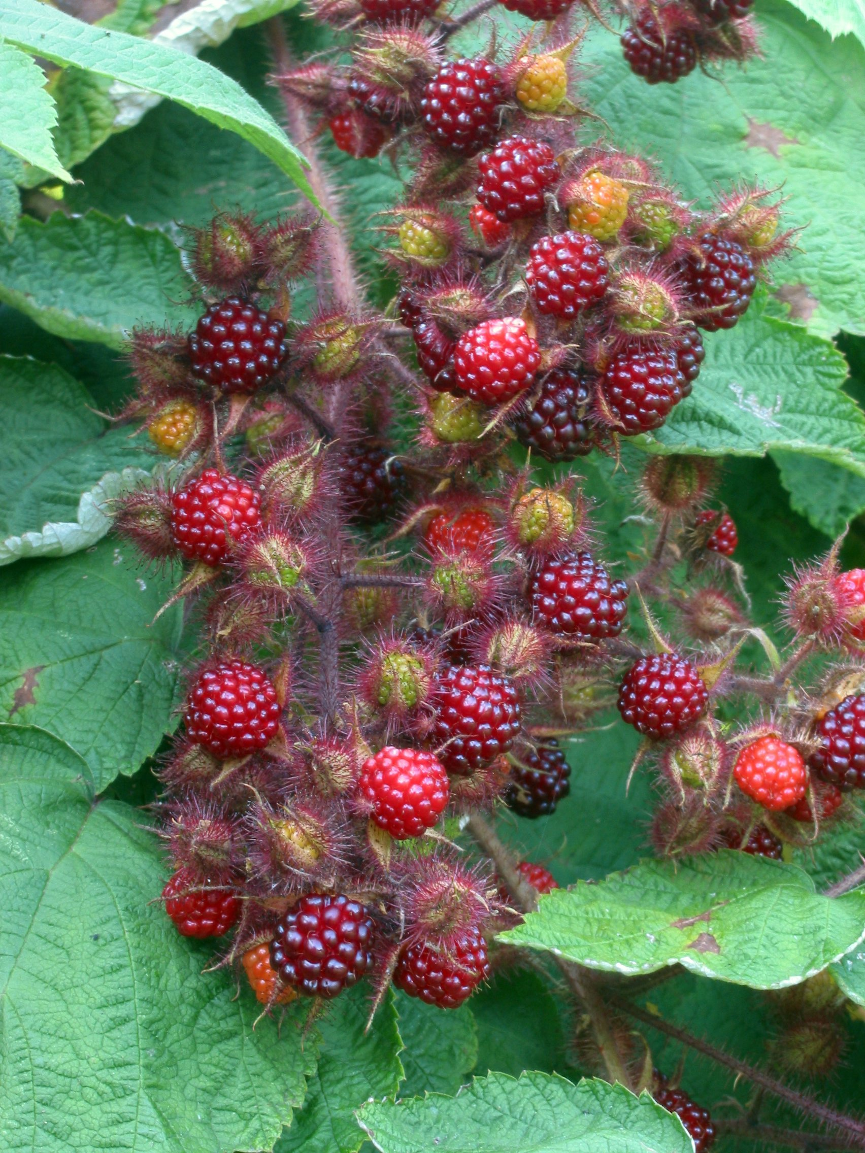 (Japanse wijnbes) Rubus phoenicolasius fruits